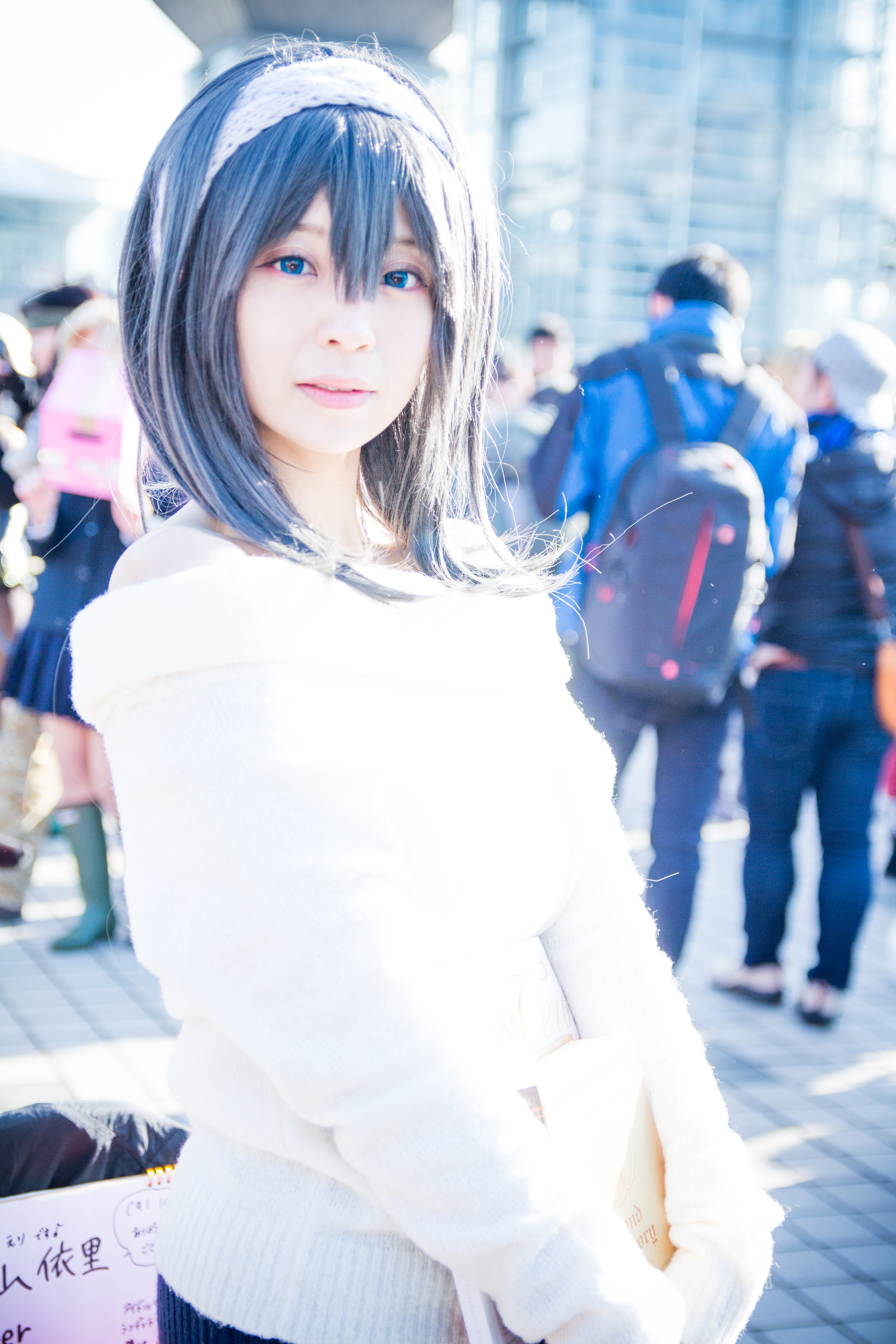 コミックマーケット91の1日目、鷺沢文香のコスプレをした秋山依里